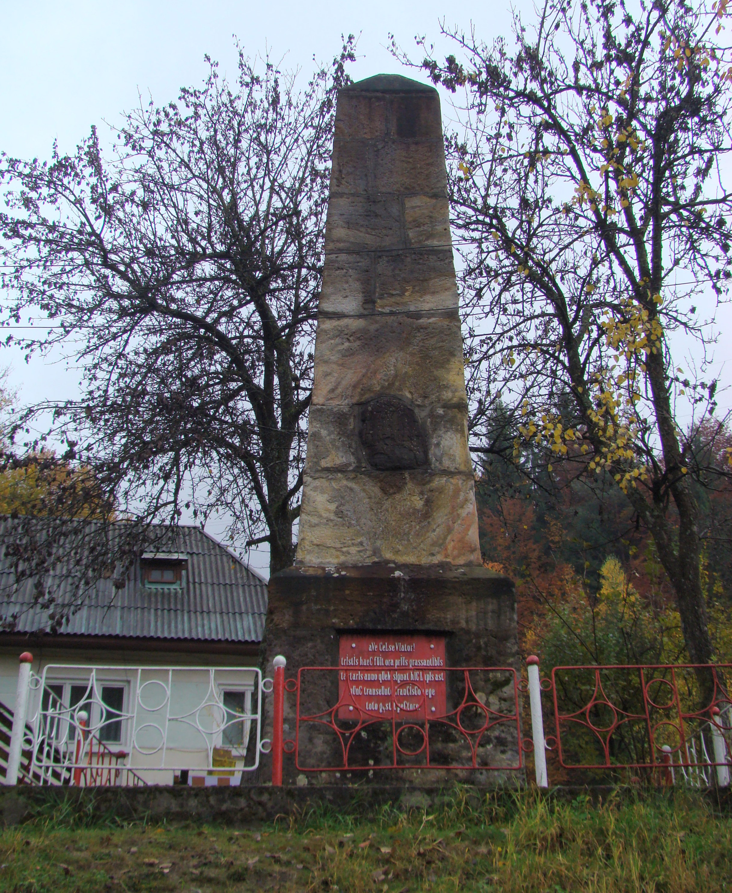 "Stâlpul Tătar", monument în cinstea victoriei din 1717 împotriva tătarilor